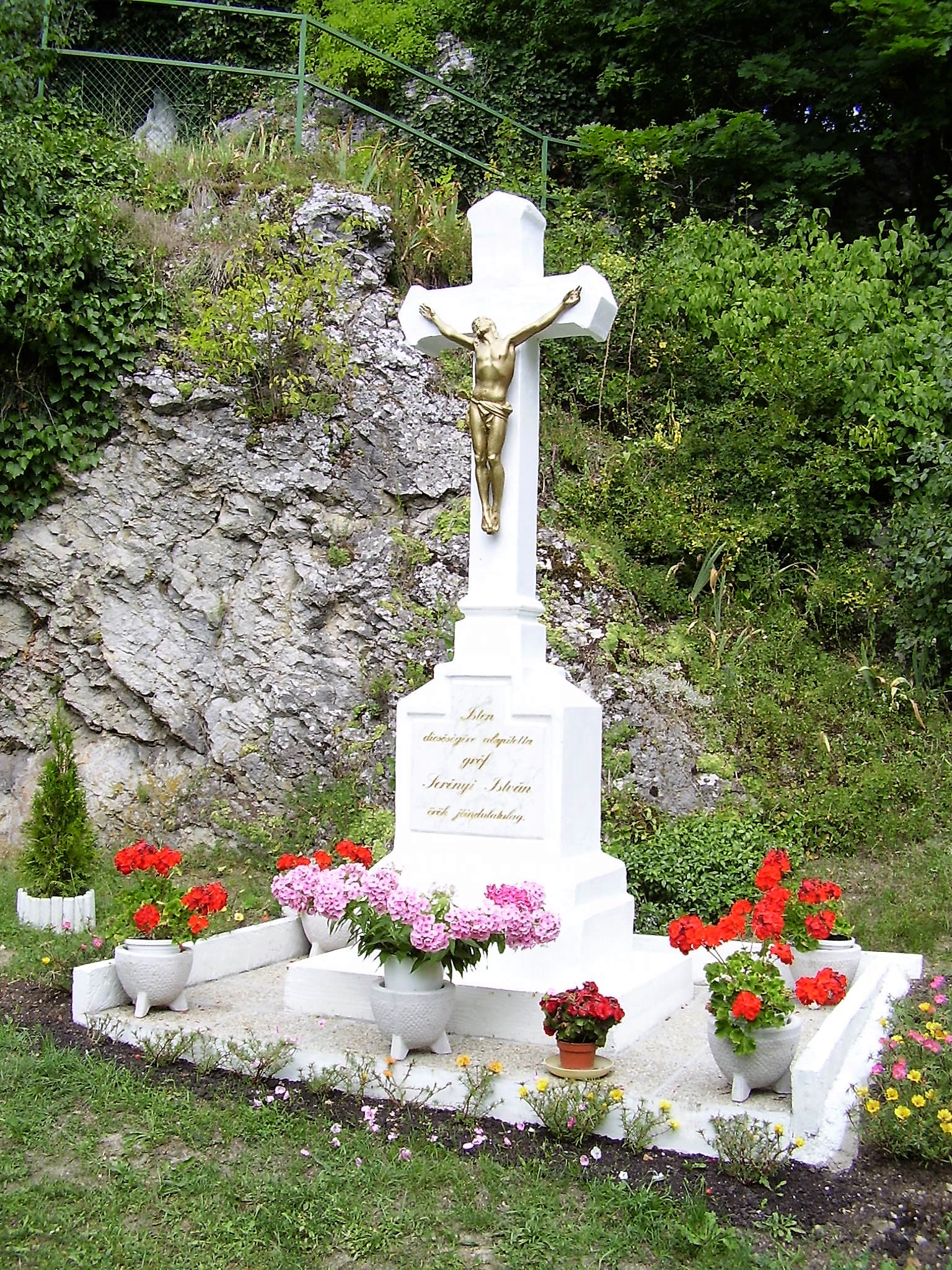 Gróf Serényi István állíttatta a kőkeresztet Dédestapolcsányban 1907. augusztus 20-án. Az 1960-as évek elején a keresztet áthelyezték a templomdobra felvezető gyalogút mellé. 2017-ben a kőkeresztet felújították, környékét rendezték.